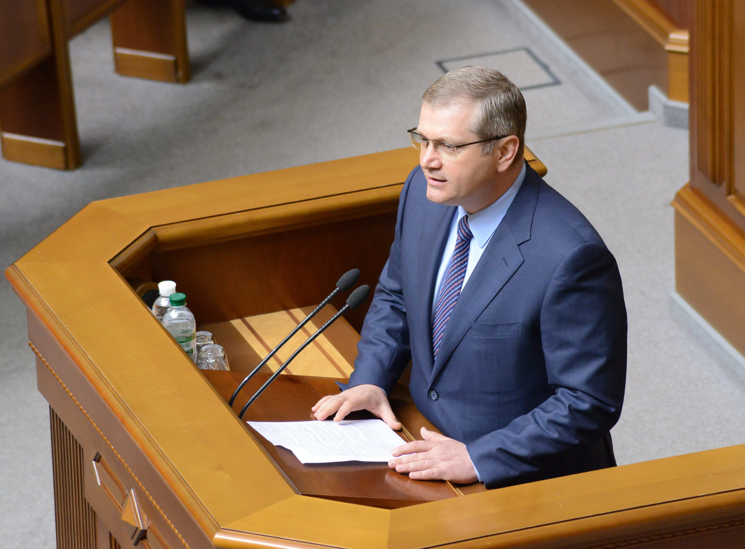 ВЕРХОВНА РАДА УКРАЇНИ 2015 , фото Вадим Чуприна